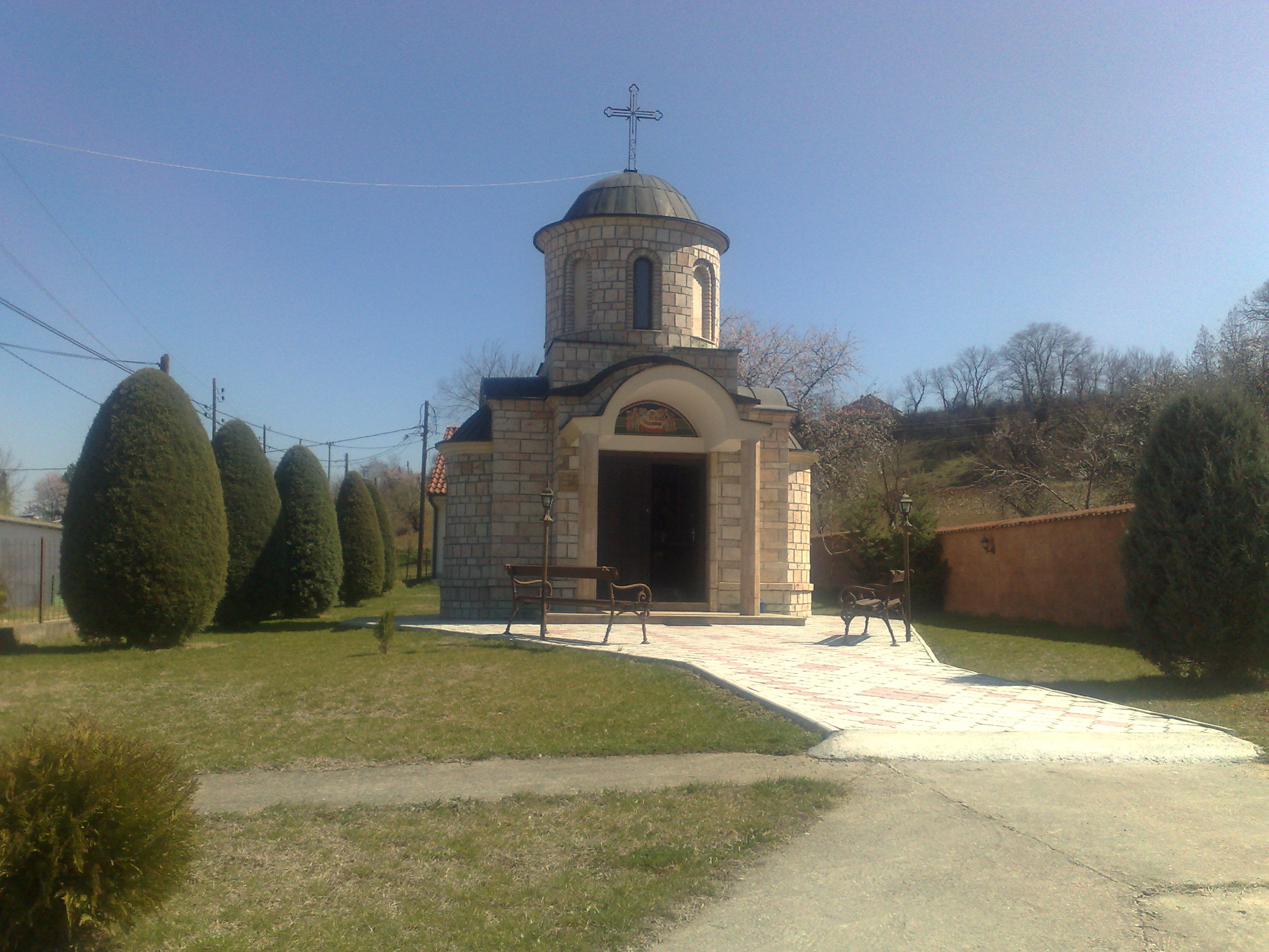 Црквата Успение на Пресвета Богородица во село Морани